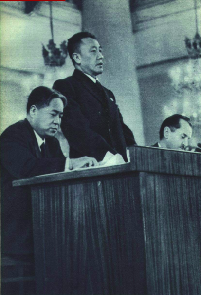 1952年 莫斯科国际经济会议 中国代表团团长南汉宸